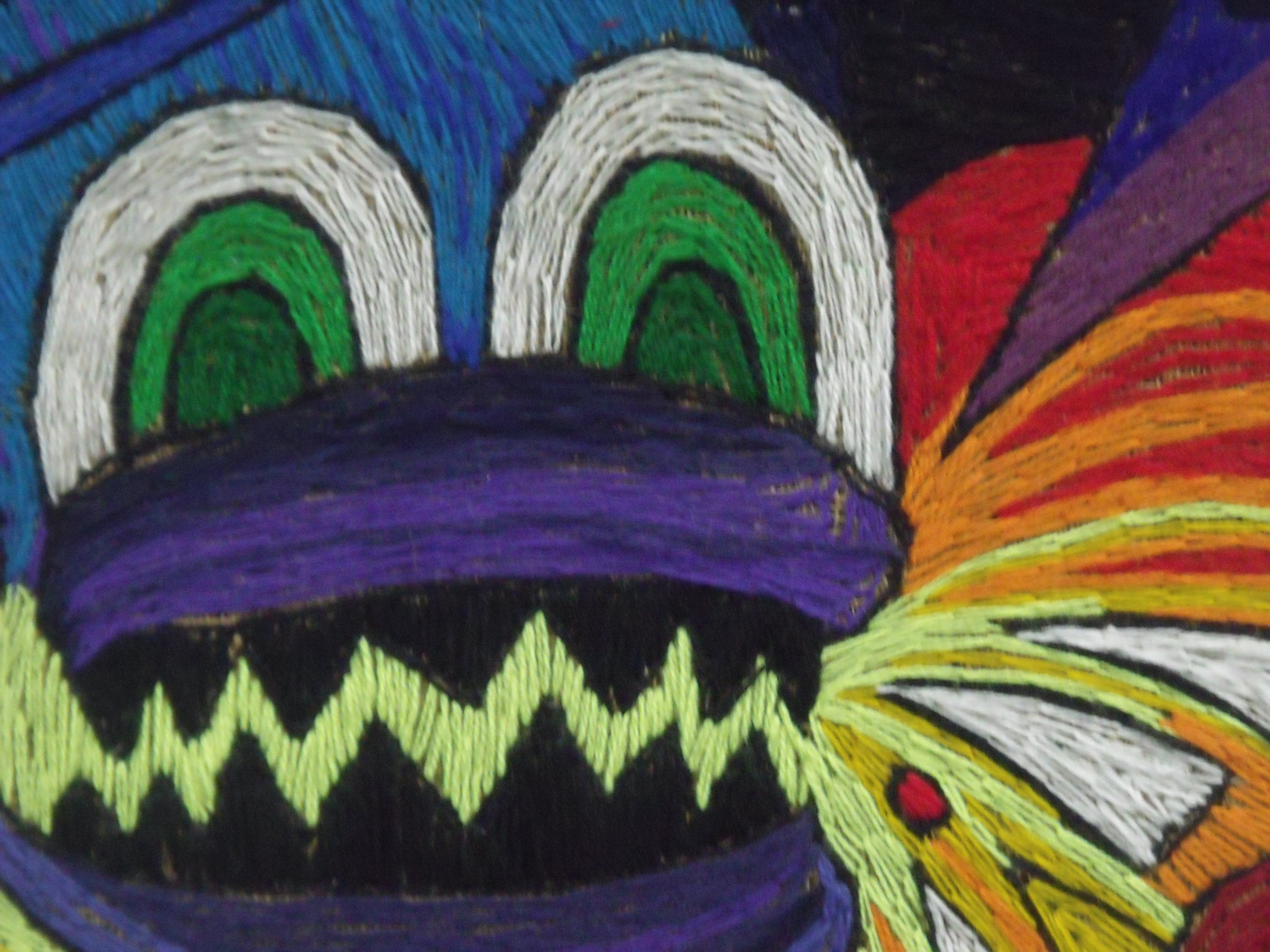 detalle de una de las tablas que forman el tapiz sobre el Guernica realizado por parte del Equipo Hoz en el Instituto Juan de Garay de Valencia en 1981